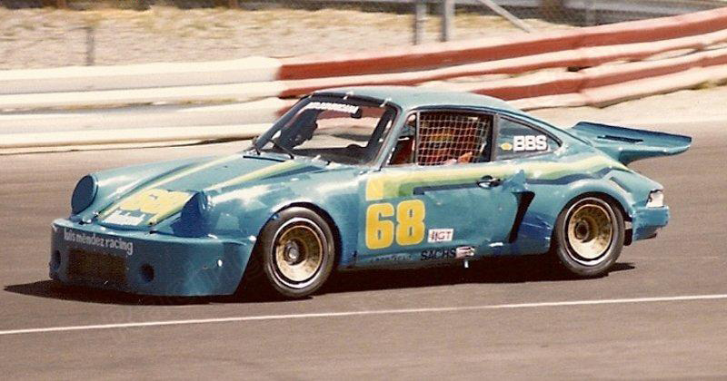 Luis Rafel Mendez, IMSA GTO